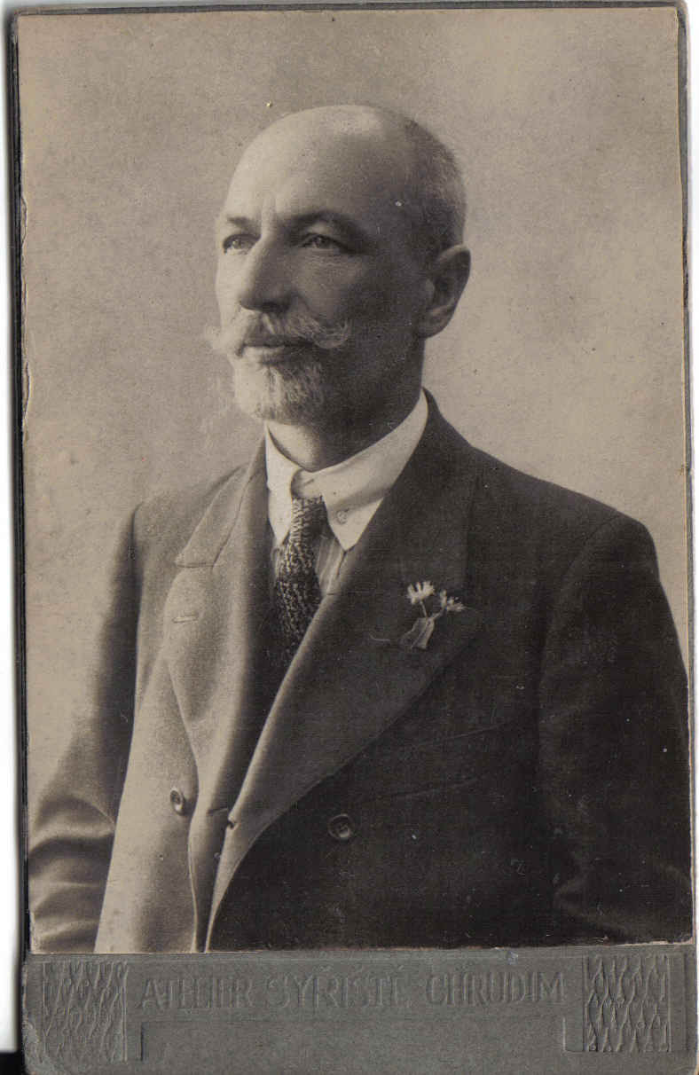 Privates Foto von Antonin Borovec, auch Anton Borowetz (1870 –1925), Tschechoslowakischer Diplomat in Czernowitz, Begründer des „Sozial innovativen Konzeptes für Witwen und Waisen.“